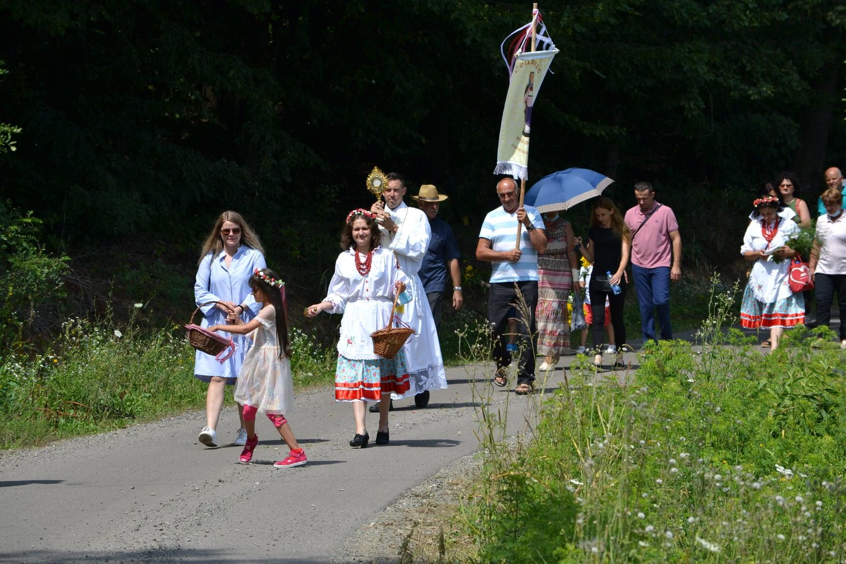 X festival poljske kulture Pirogijada – povorka